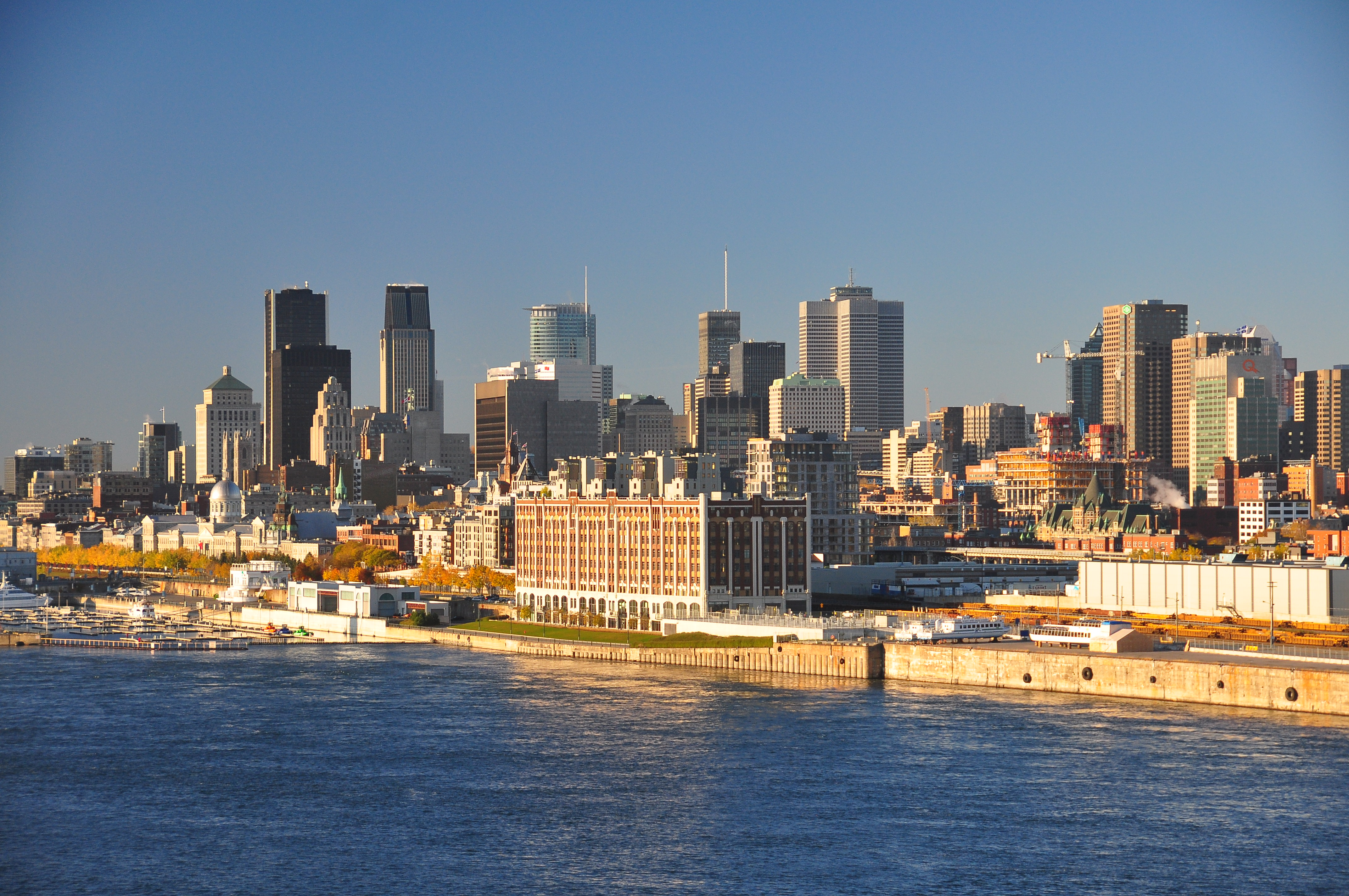 Montréal